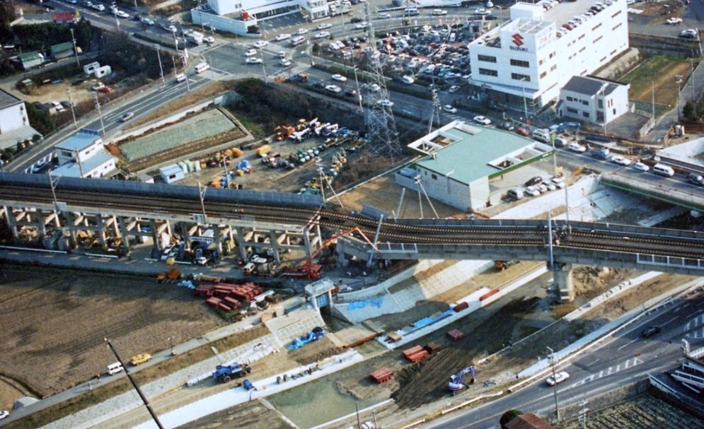 伊川谷町別府 県道21号線白水橋交差点周辺～山陽新幹線沿（1995年1月27日）